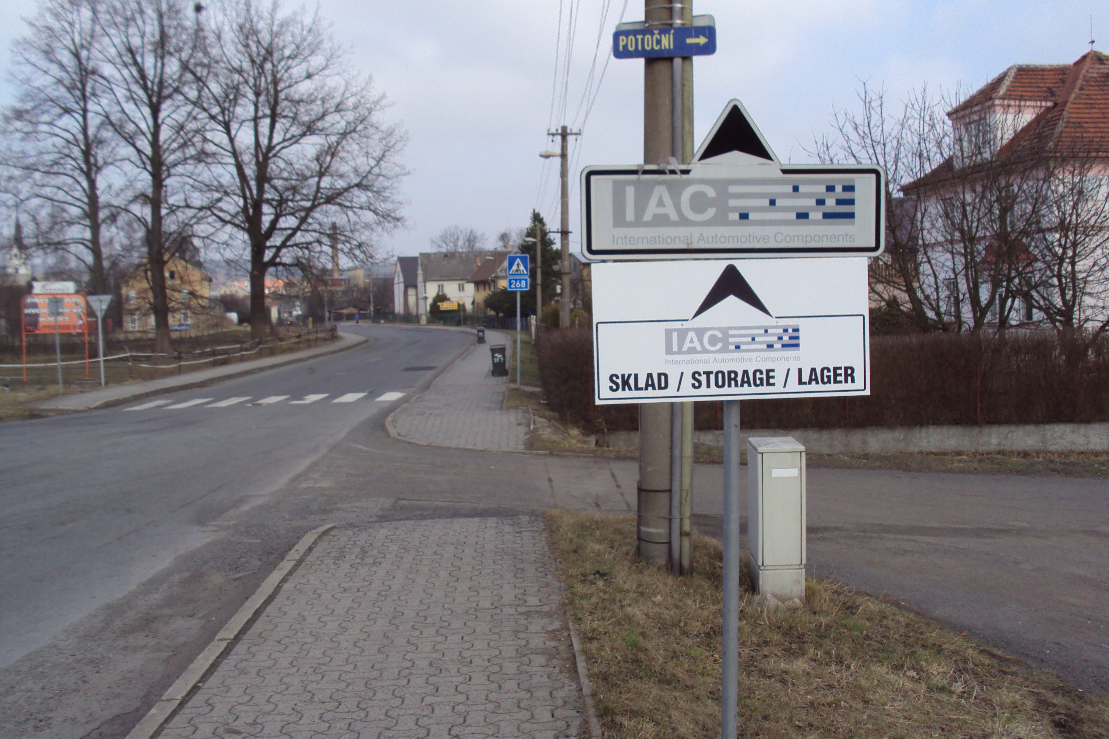 Směrovka v Mimoňské ulici k firmě IAC na druhém konci Zákup